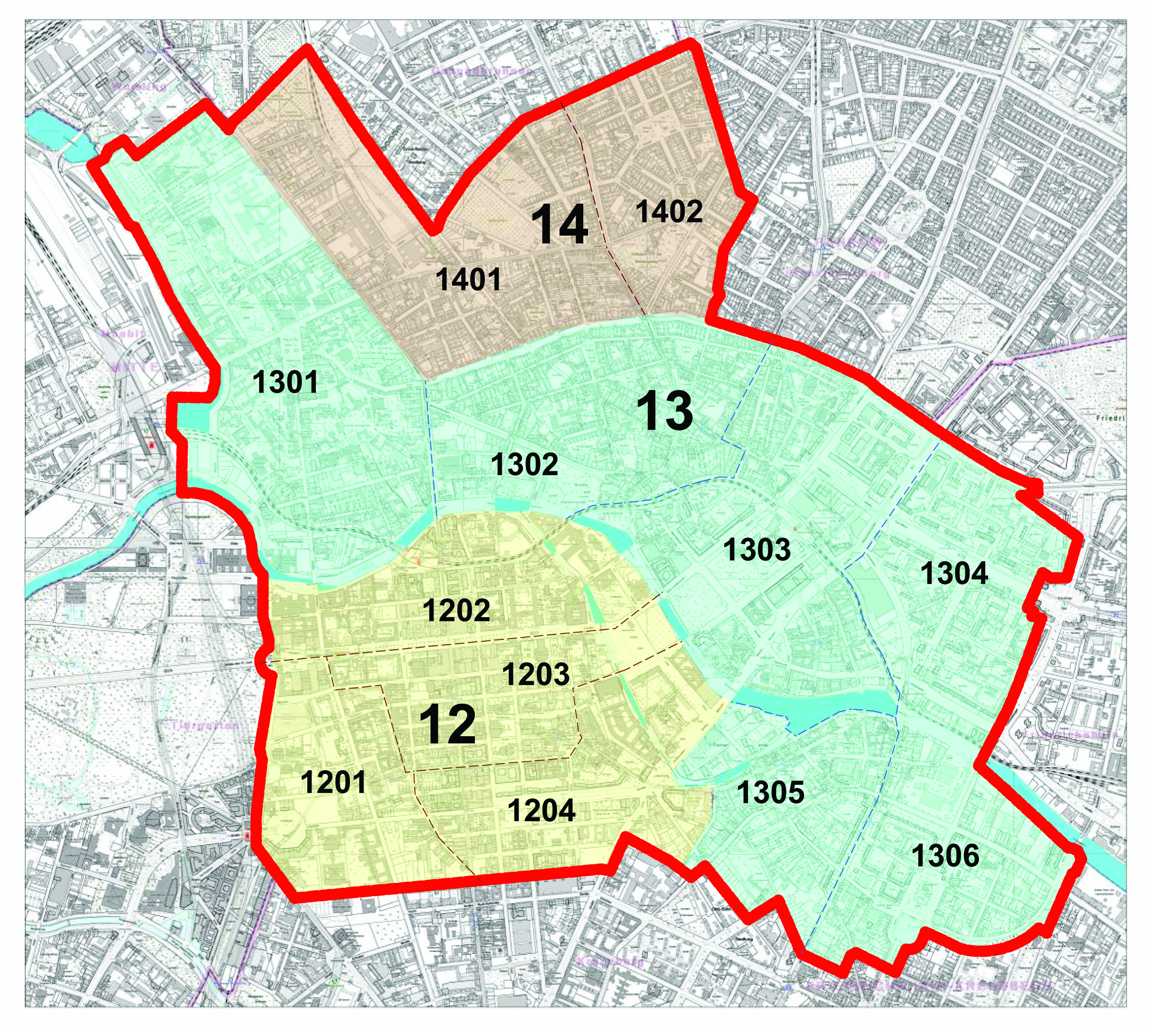 Bezirksregionen Ortsteil Berlin-Mitte